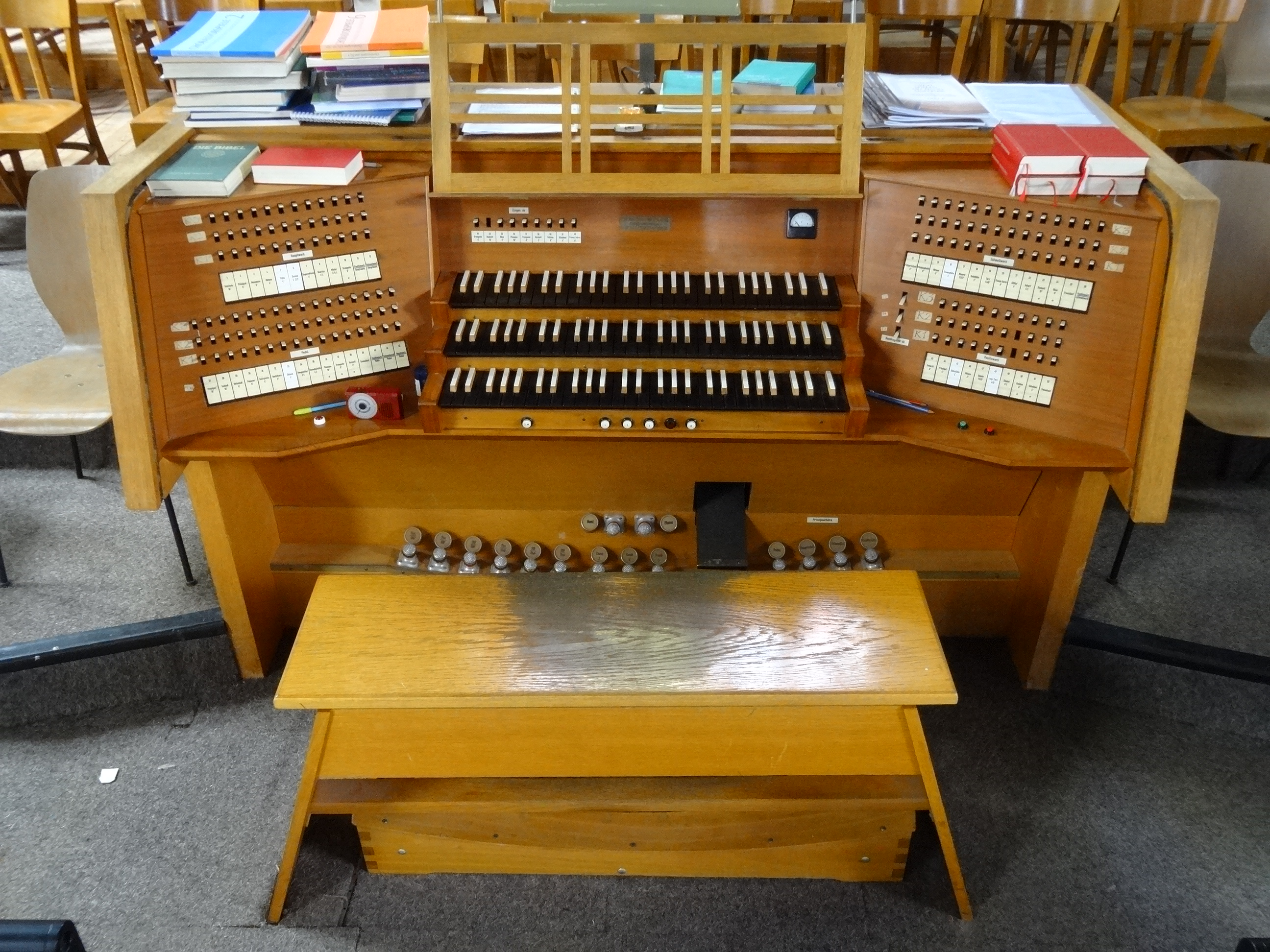 Johanneskirche (Gießen)